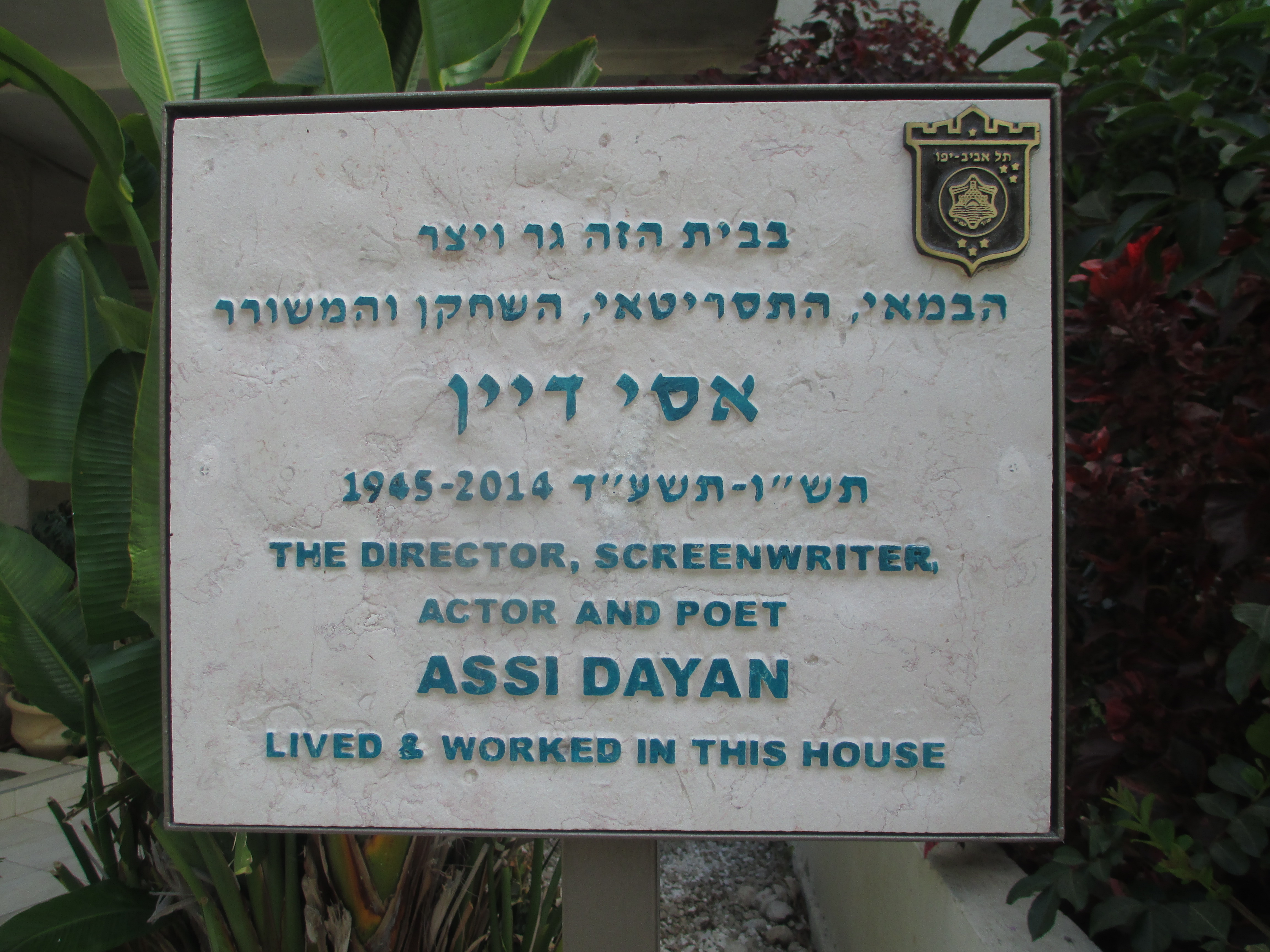 לוחית זיכרון בכניסה לביתו של אסי דיין בשדרות נורדאו 81 בתל אביב